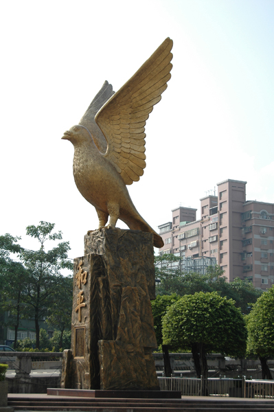 永和市和平鴿。